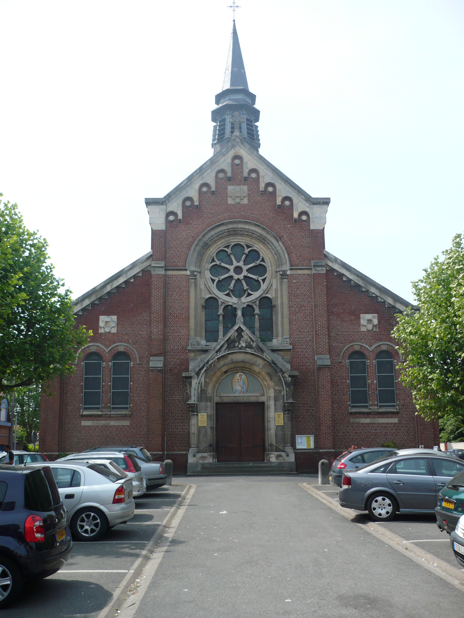 église Notre Dame du Bon Secours de NIEPPE(Pont) 59850 France, vitraux de Luc Six, fin années 60